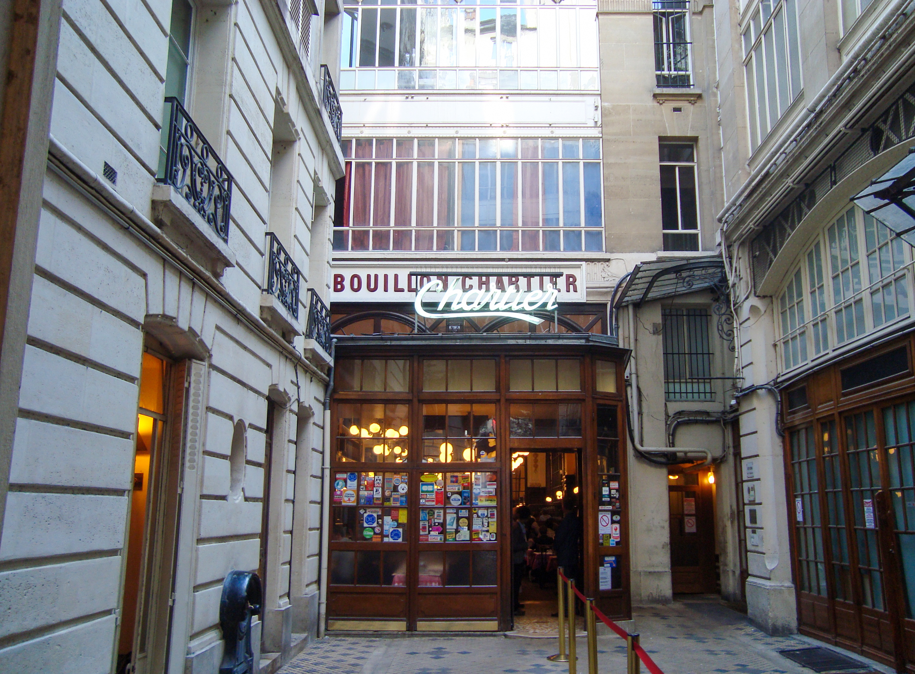 Entrée du Bouillon Chartier, fondé en 1896, au 7, rue du Faubourg-Montmartre